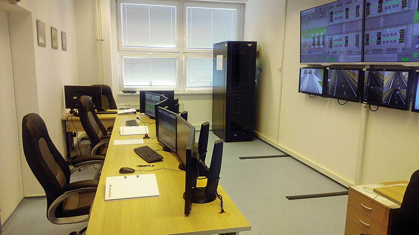 Vybavenie laboratória KTMS simulátor riadenia3